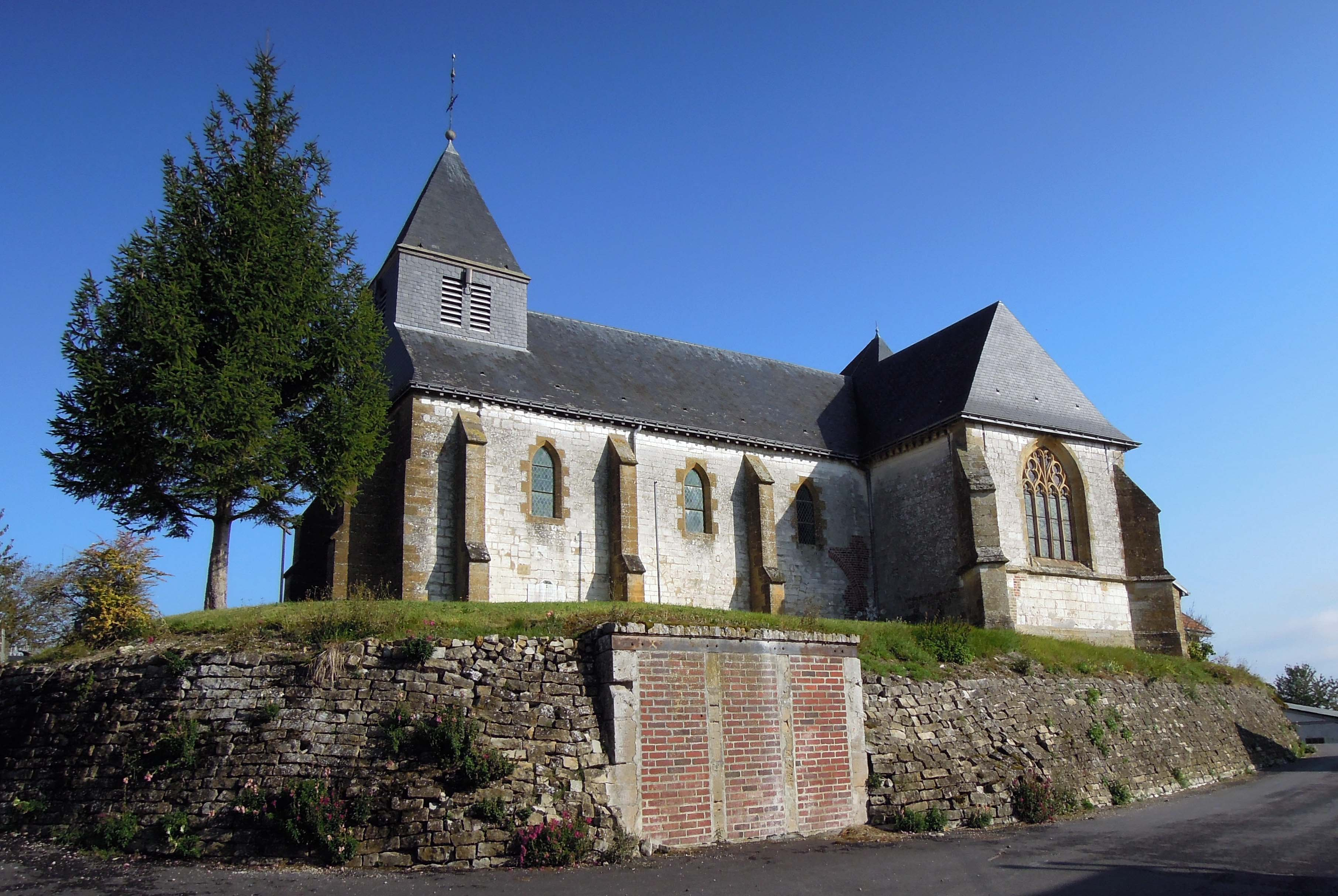 Église Saint-Martin, (Inscrit, 1926) .